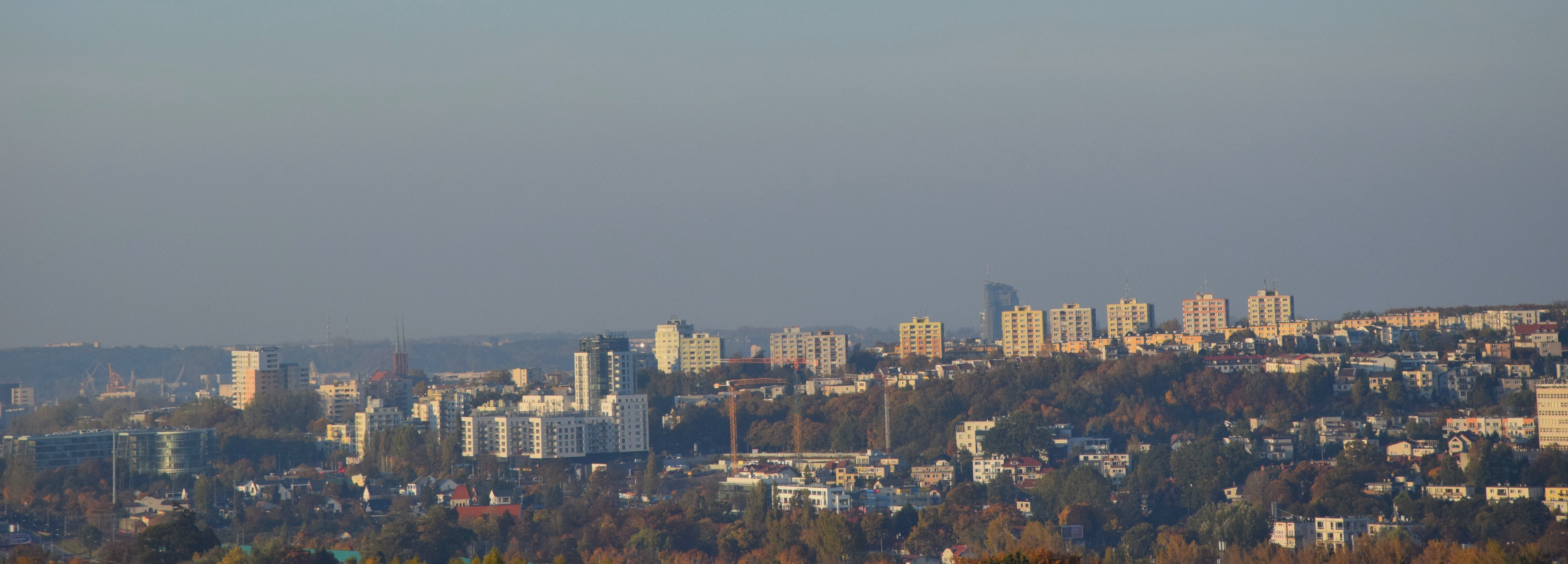 Panorama gdyńskiej dzielnicy Redłowa - widok z wieży widokowej w Kolibkach.